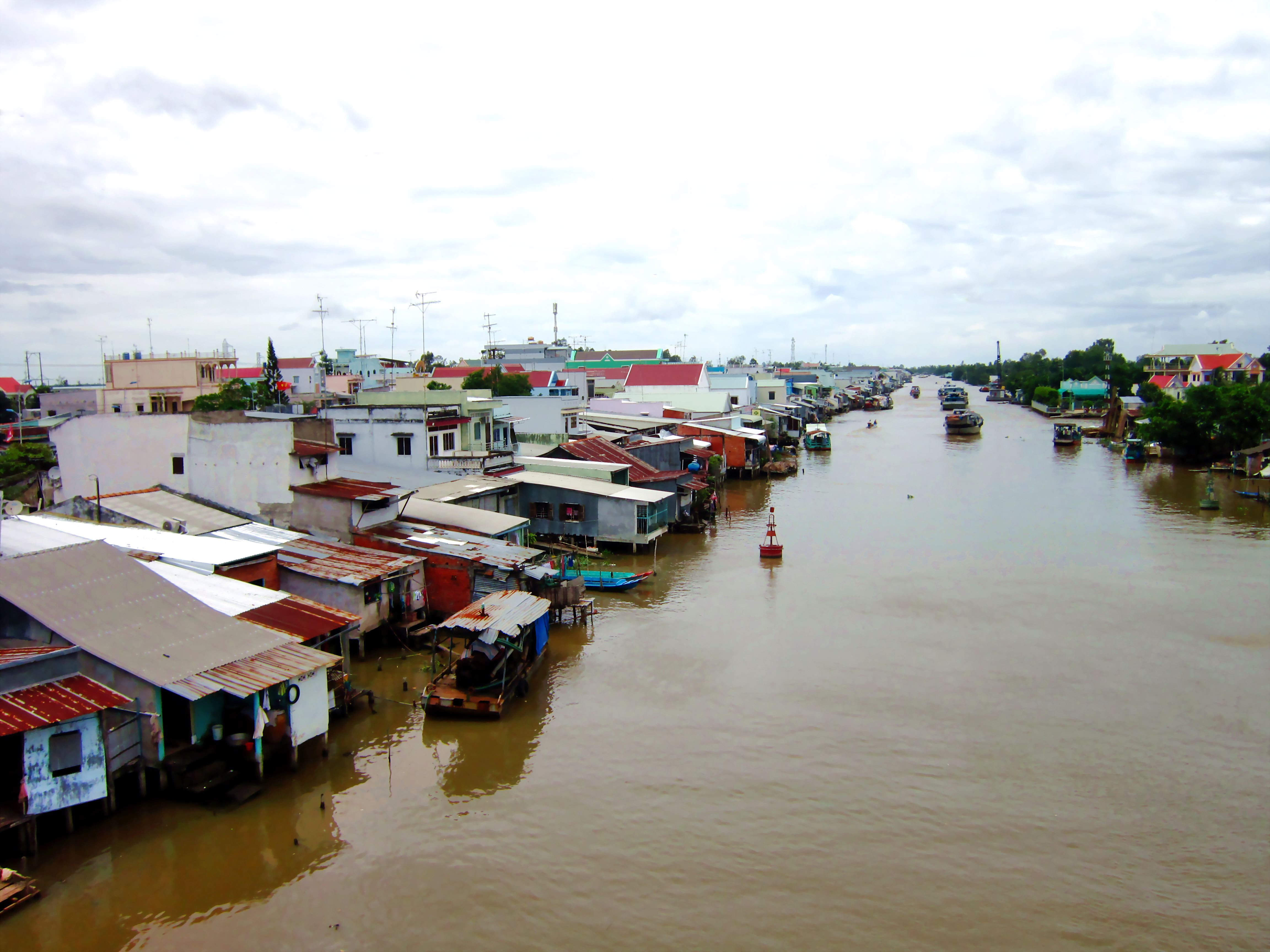 Phố chợ thị trấn Sóc Sơn (phải ảnh) nằm bên kênh Rạch Giá – Hà Tiên, thuộc tỉnh Kiên Giang, Việt Nam.